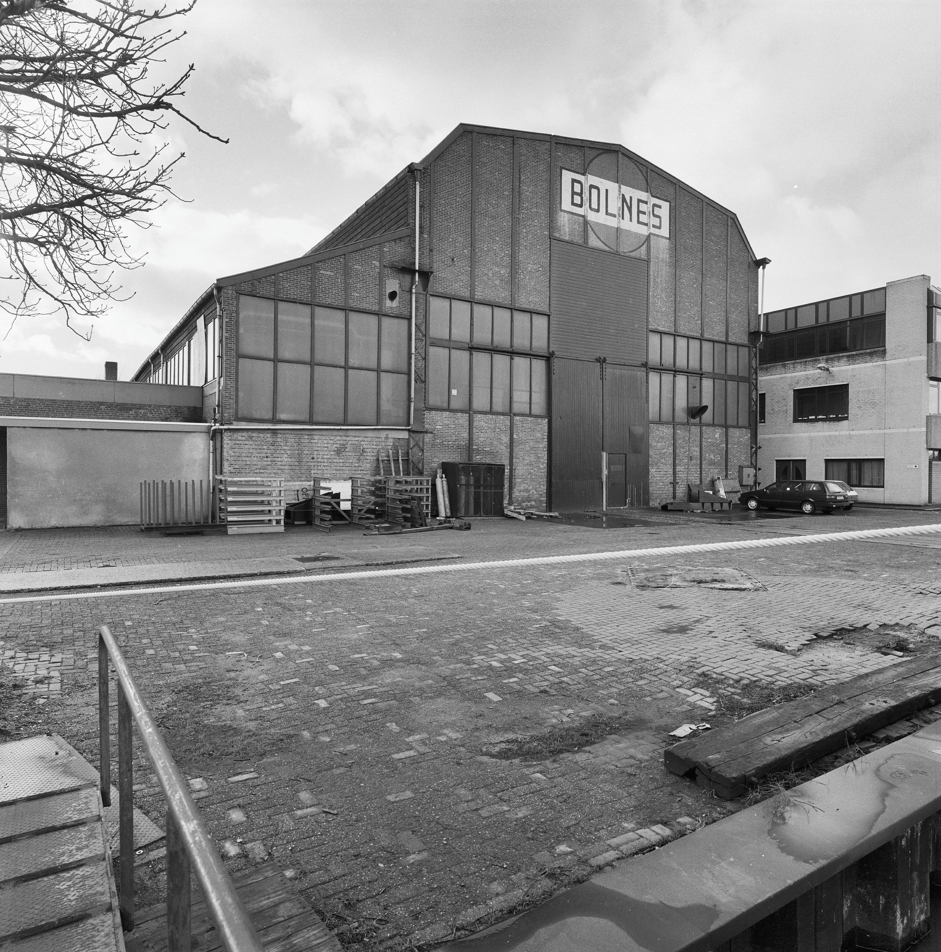 MACHINEFABRIEK BOLNES: Exterieur VOORGEVEL